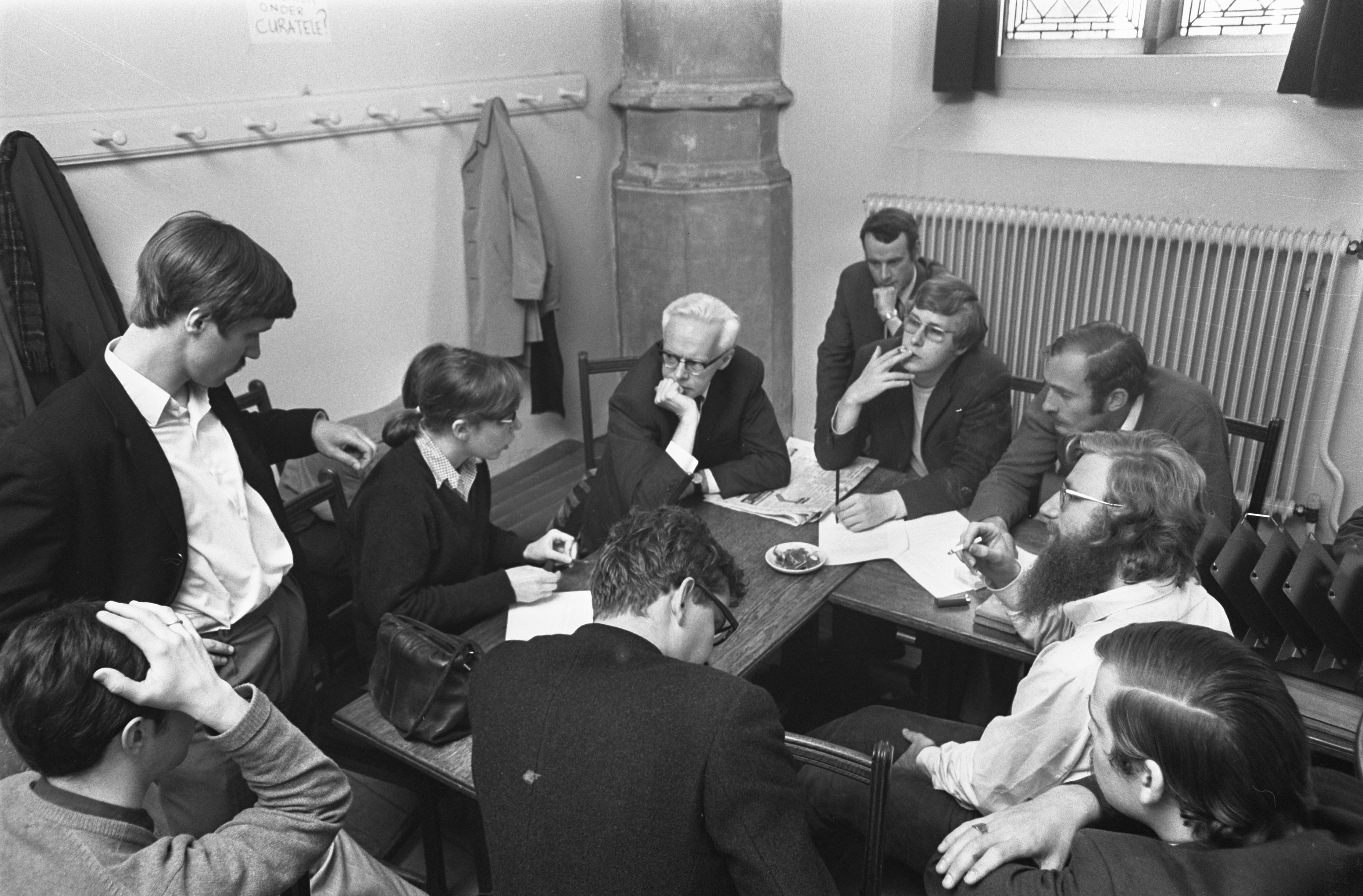 Discussies in Academiegebouw van Leidse Universiteit van vertegenwoordigers van studenten, curatoren en senaat. Prof. Drion (2e van links -wit haar) met studenten. 12 mei 1969. Papier op muur met de tekst: Onder curatele?